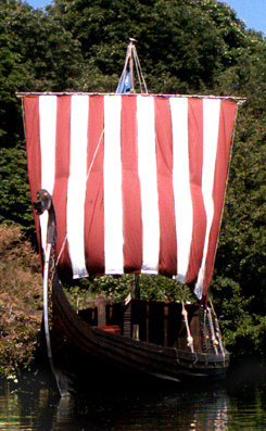 bateau viking Gungnir, voilier de 18.10 m x 3.95 m , 1.2 m de creux, 0.85 de tirant d'eau, 4.30 m ou 3,25 m de tirant d'air selon que la tête du Dragon est levée ou non pour franchir les ponts. 12 rameurs, 60 m² de voilure, dix boucliers. Ce navire est inspiré par le bateau de Gokstad visible au musée d'Oslo à Bygdøy, fabriqué principalement en chêne. Gungnir est essentiellement faite en pin du nord. Construit en 2001 en Suède, Thorgis et ses compagnons naviguèrent dans les mers Scandinaves dans les conditions de l'époque viking, puis après trois semaines ils arrivèrent à Paris en août 2005. Gungnir est actuellement en carénage. L'auteur de la photo est Thorgis. Licence